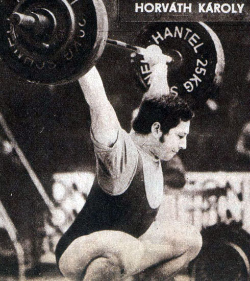 Horváth Károly súlyemelő